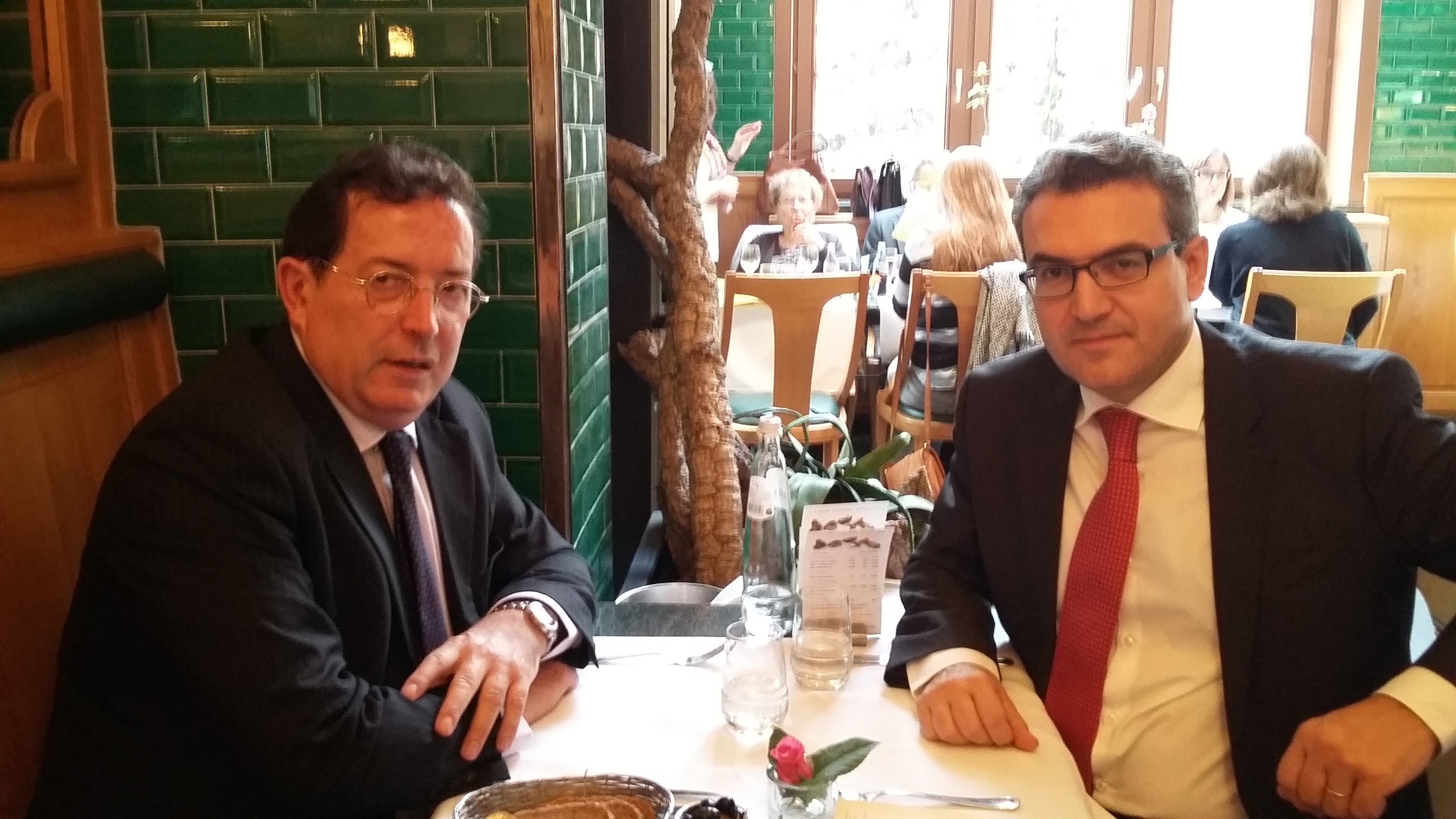 Déjeuner de travail à Bxl 11 novembre 2015